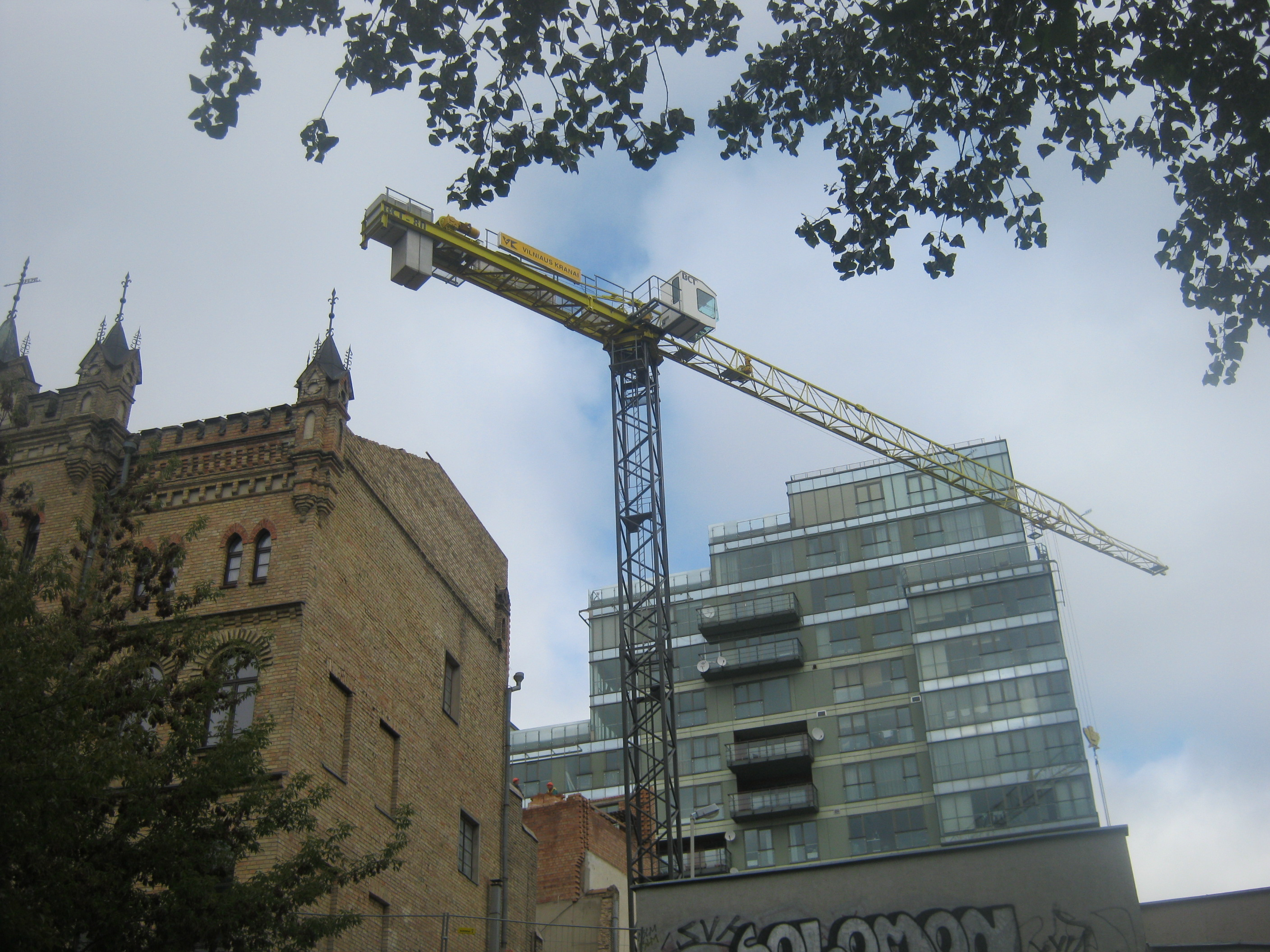 Vilnius